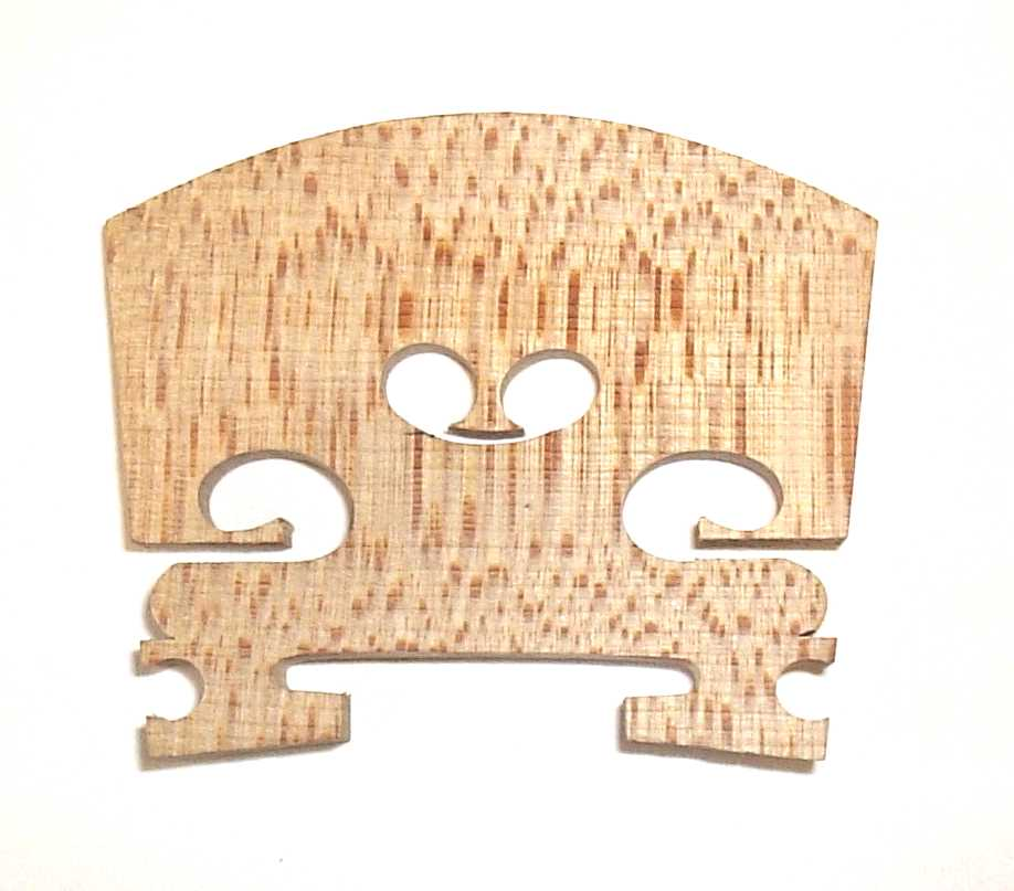 Bildbeschreibung: Steg-Rohling für Violine Fotograf/Zeichner: M. Kuhlberg (Netazon) Datum: 2006-02-26